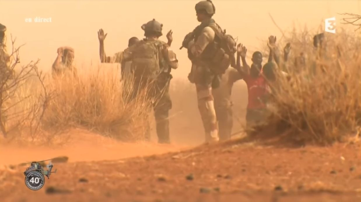 Miliaires français et maliens au nord-est de Gao en 2017